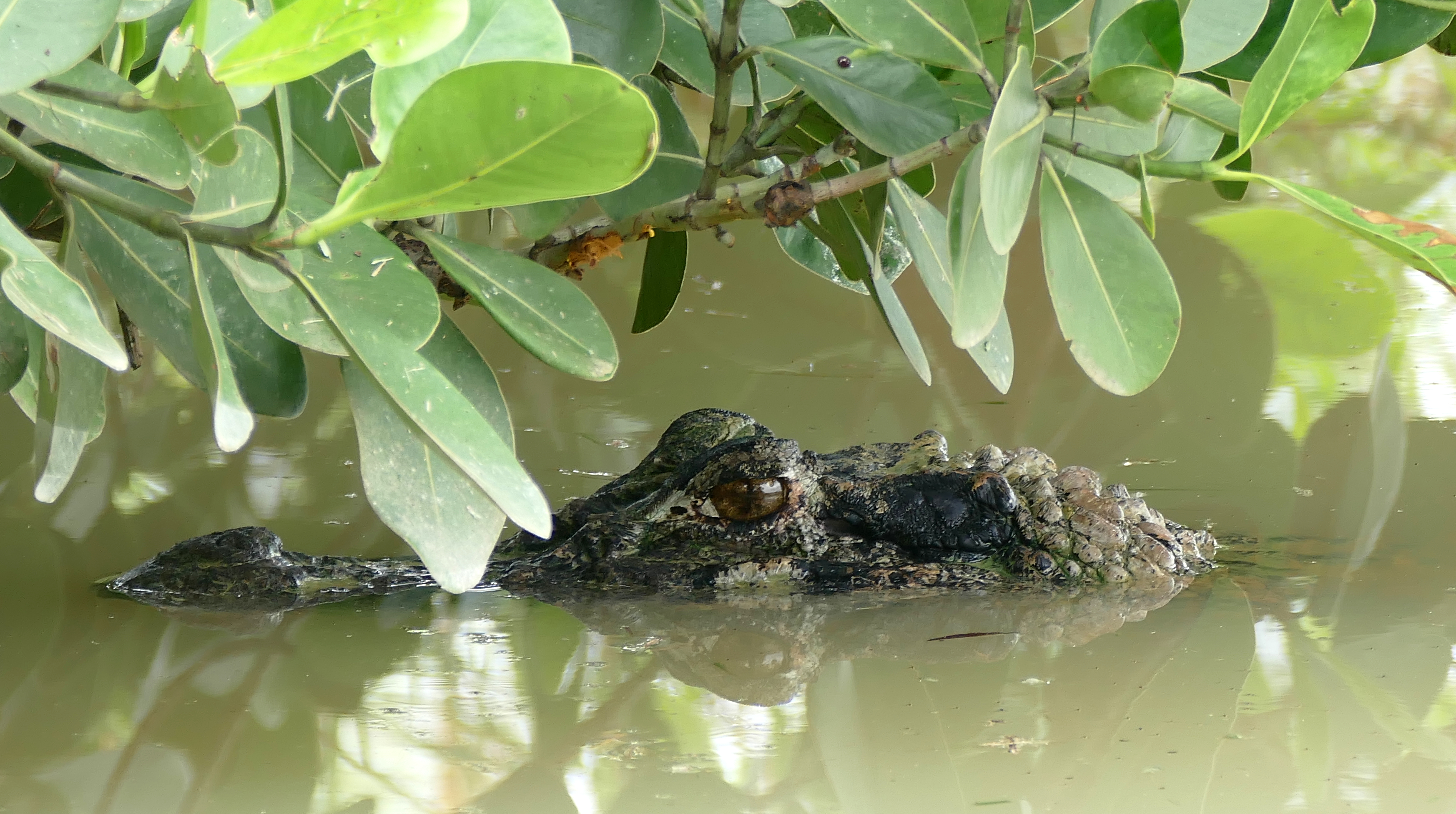 Zoo de Guyane, Macouria, French Guyana, FRANCE